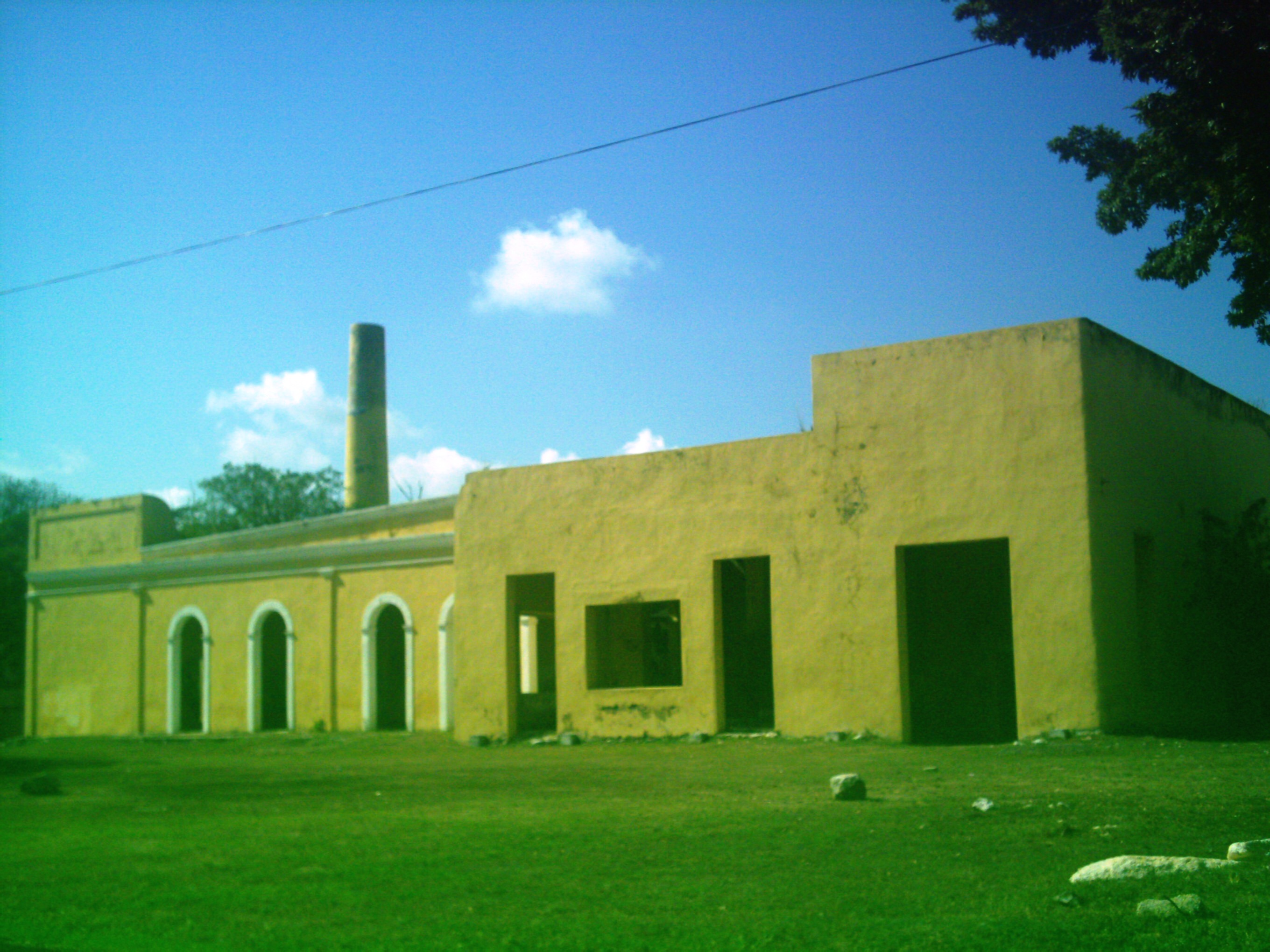 Exhacienda de Xcumpich, Yucatán.